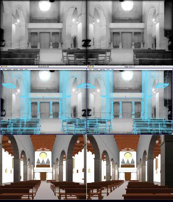 Rilievo fotogrammetrico del modello virtuale della Cattedrale di Acerenza